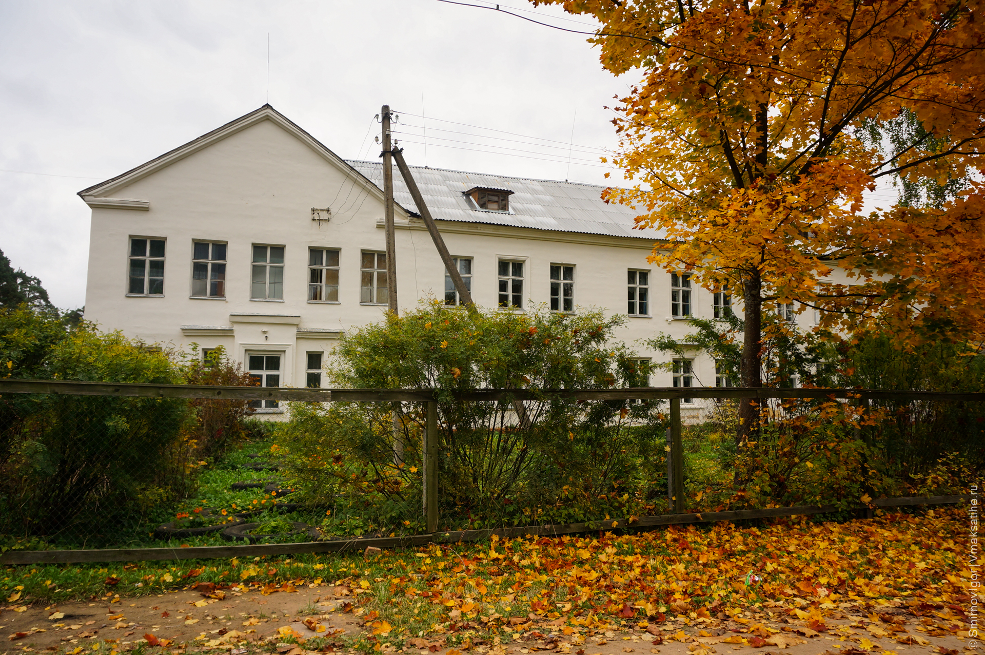 Максатихинская средняя общеобразовательная школа № 2